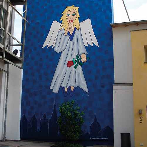 Liebevoll und präsent zugleich mahnt der Friedensengel zum Innehalten und hält in seiner Linken eines der großen Symbole der Liebe - eine rote Rose.